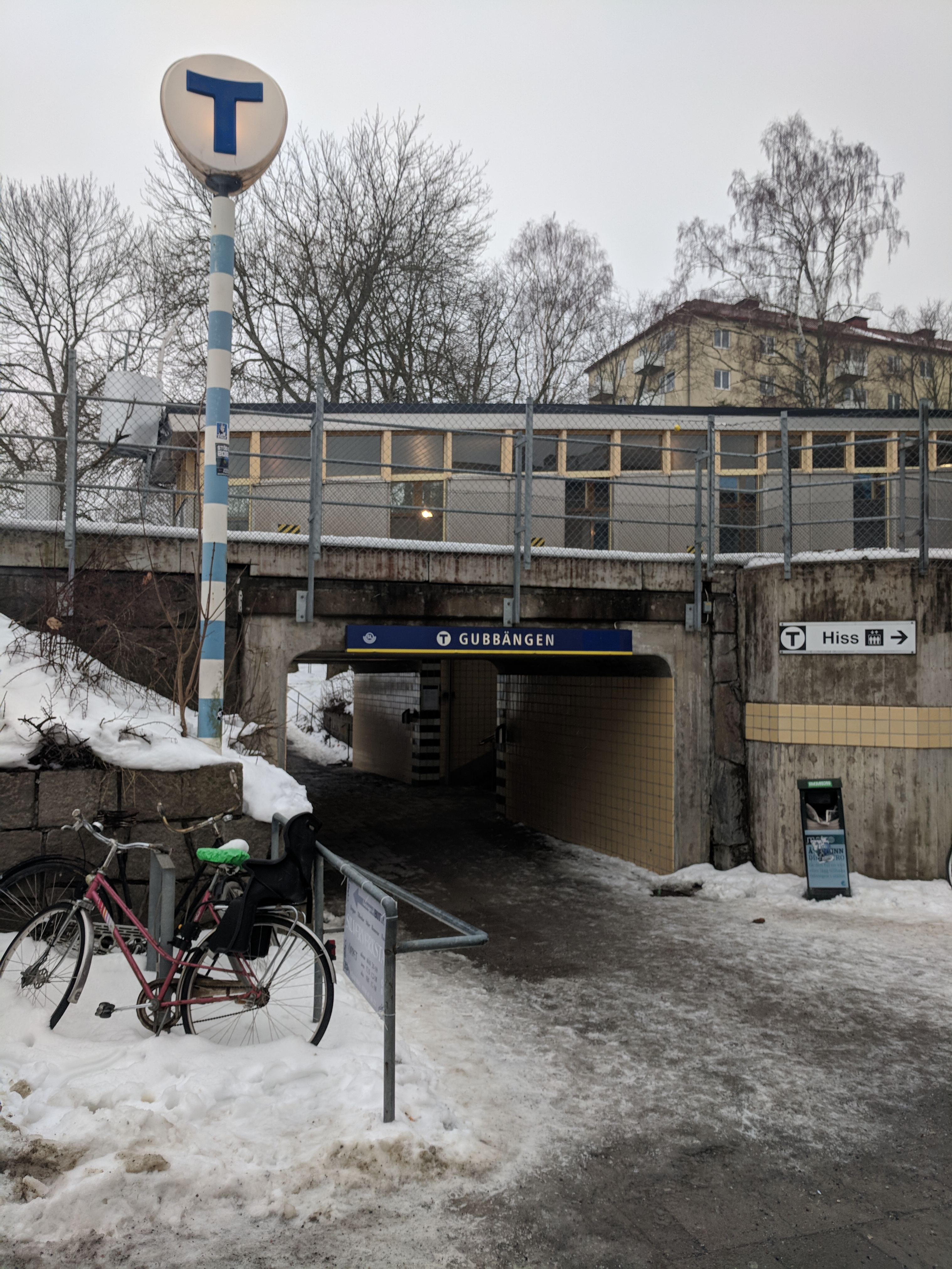 Gubbängen Metro